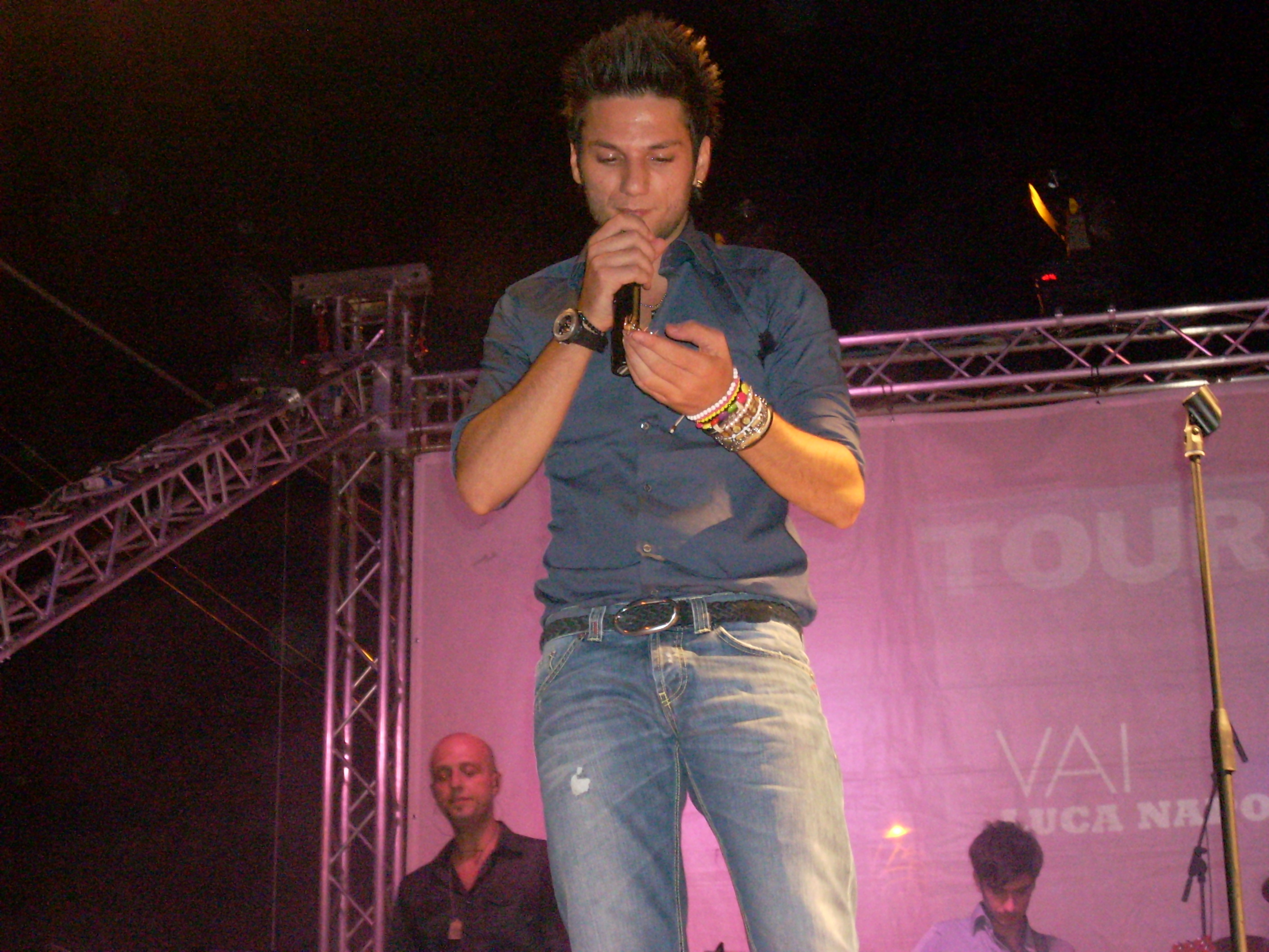 Luca Napolitano Tour Estito di "Vai"